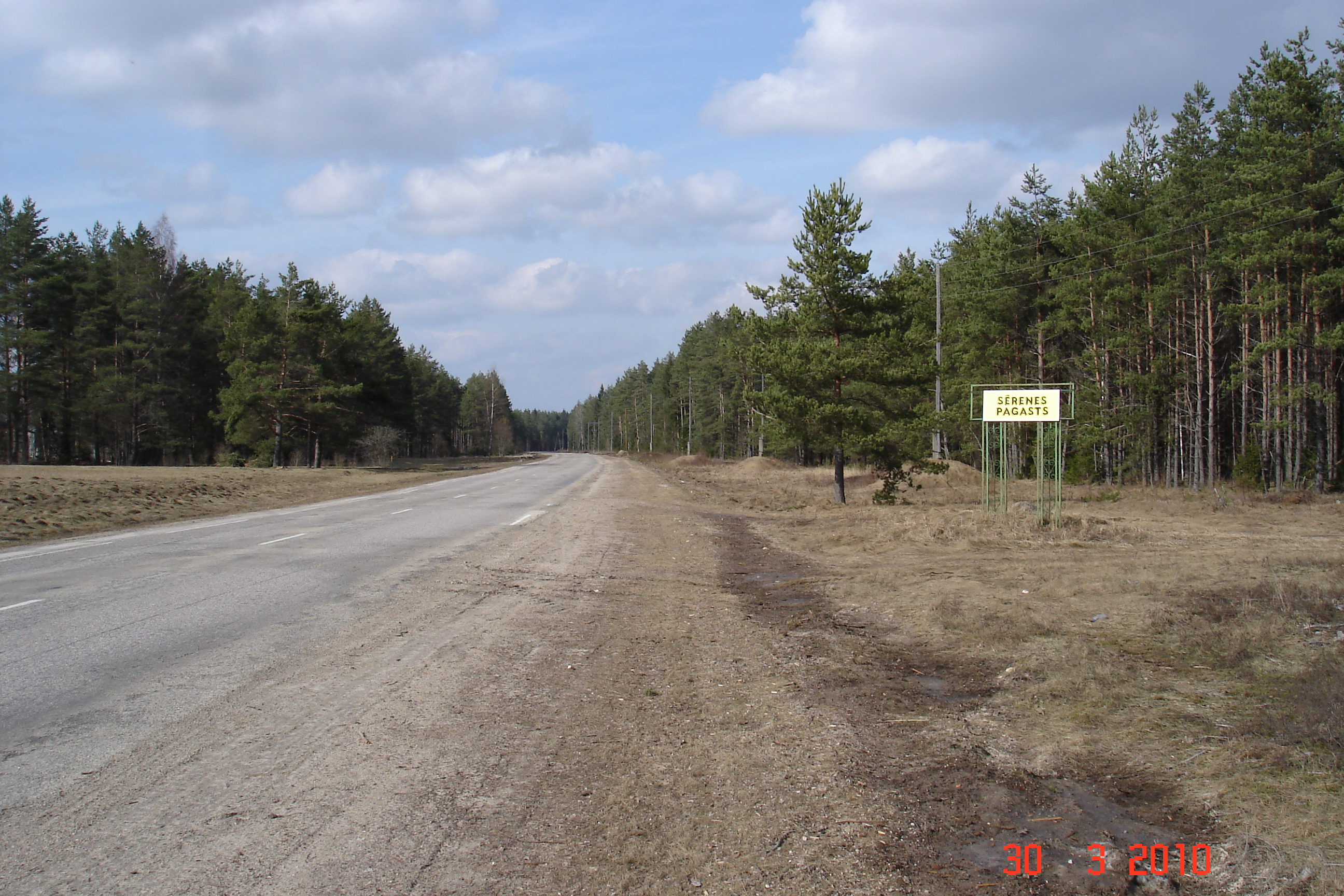 Sērenes pagasta zīme